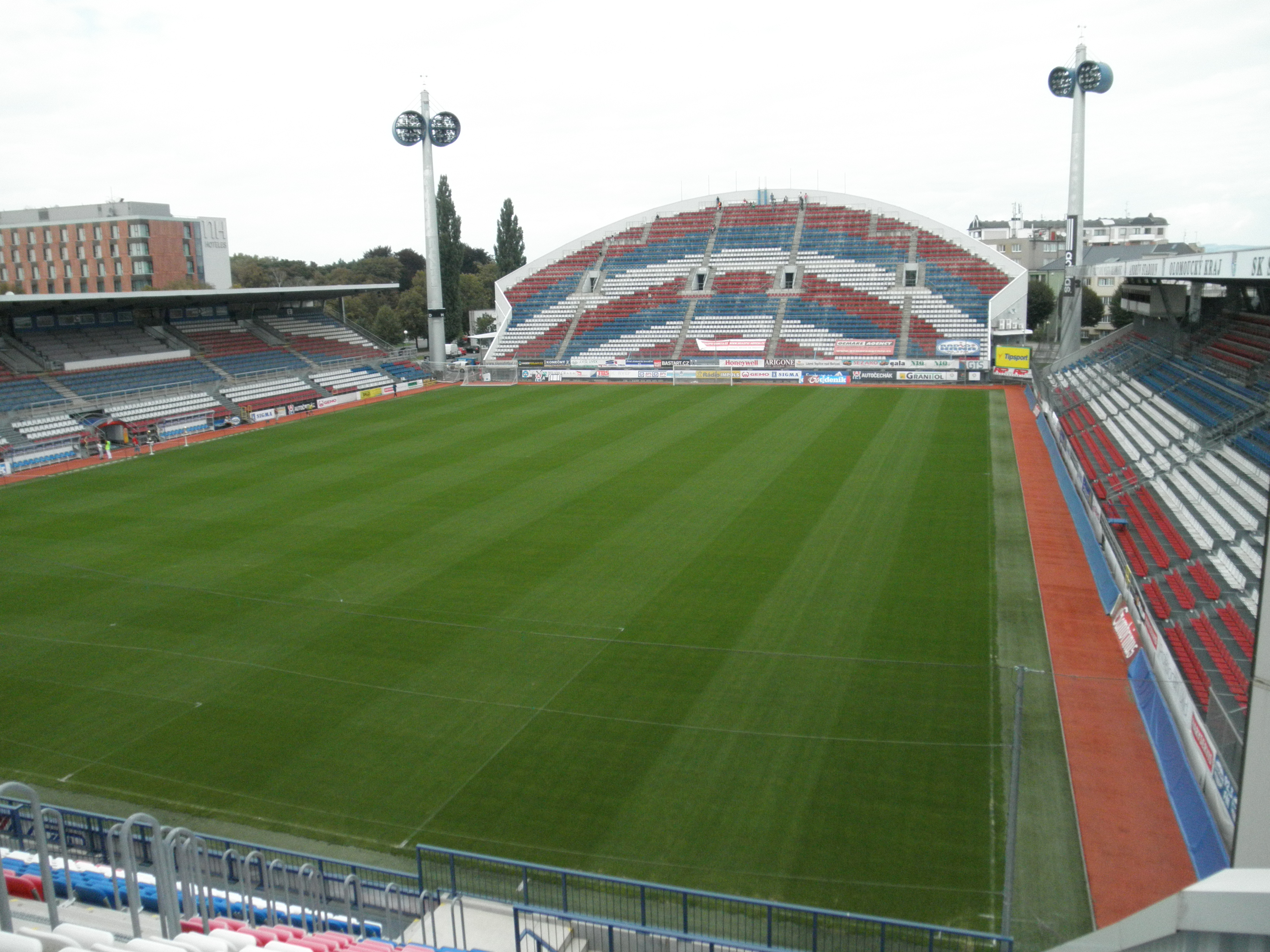 Andrův stadion v Olomouci.